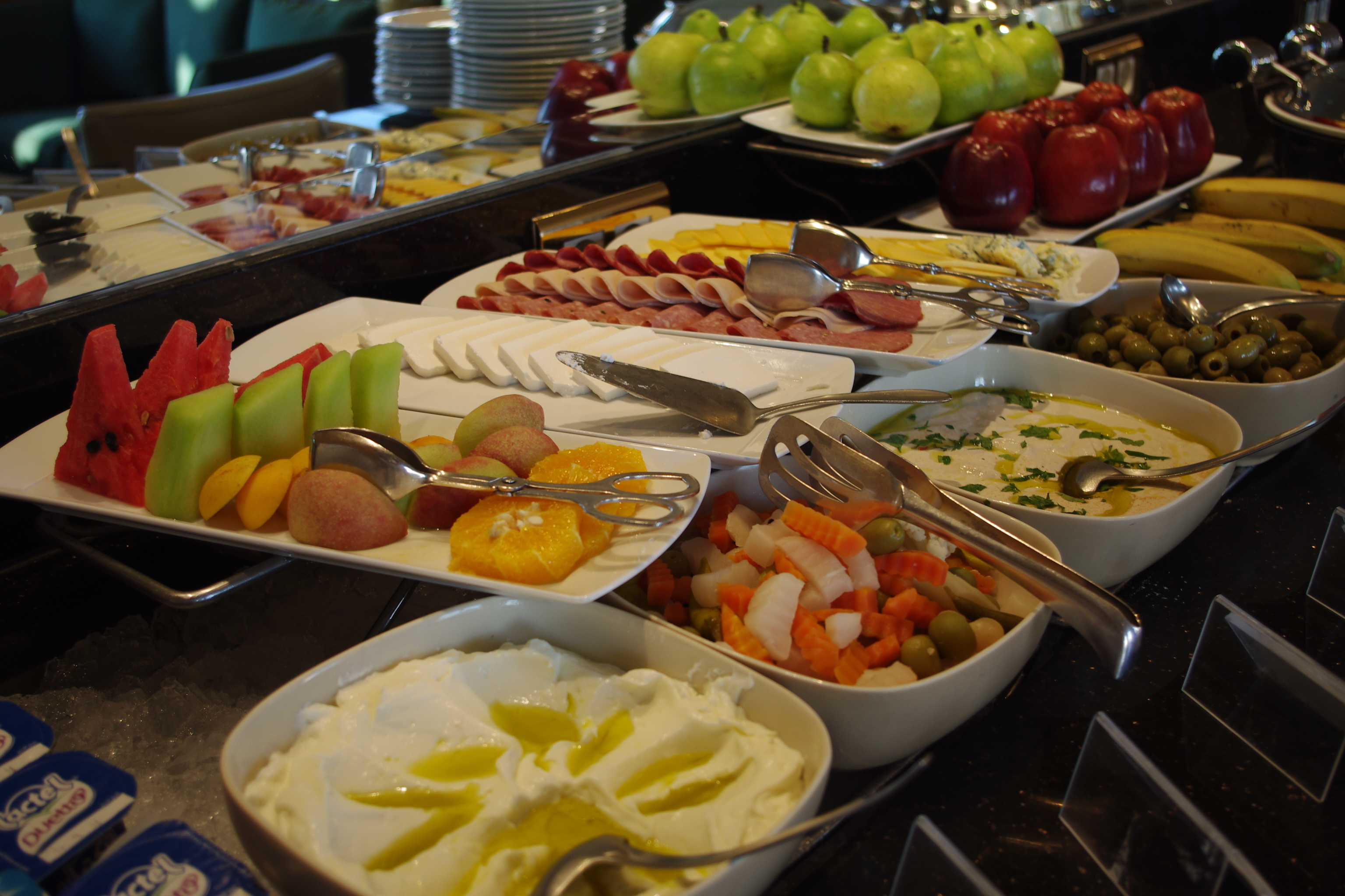 Buffet brekafast